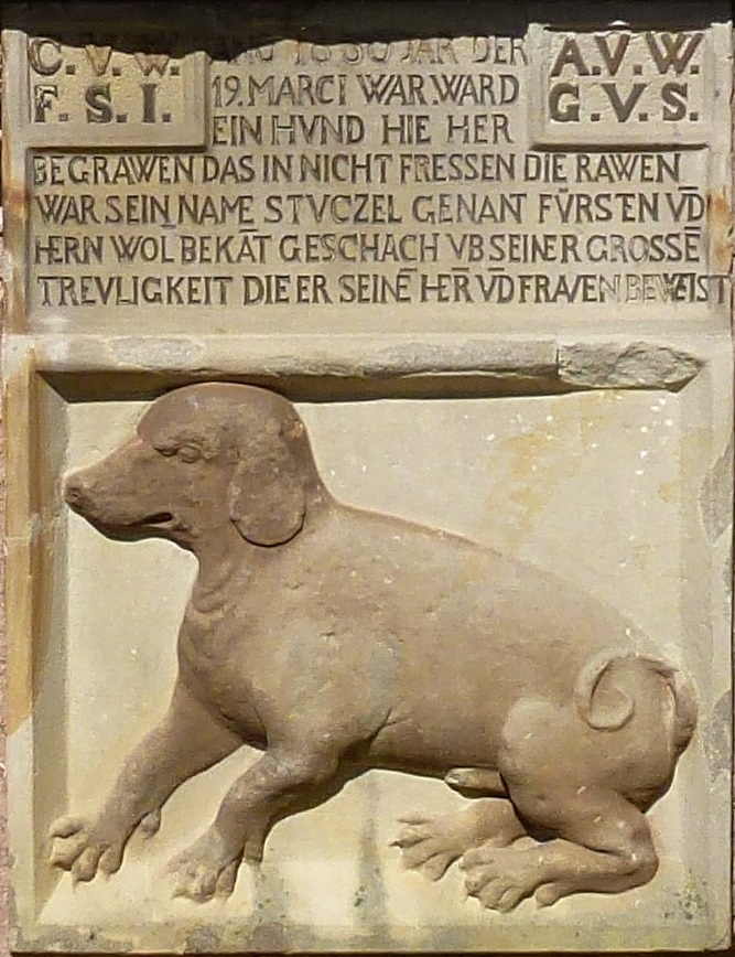 Winterstein, Hundedenkmal Detail Inschrift: ANO 1630 JAR DER 19. MARCI WAR. WARD EIN HUND HIE HER BEGRAWEN DAS IN NICHT FRESSEN DIE RAWEN WAR SEIN NAME STUCZEL GENANT FÜRSTEN UD HERN WOL BEKAT GESCHACH UB SEINER GROSSE TREULIGKEIT DIE ER SEINE HER UD FRAUEN BEWEIST